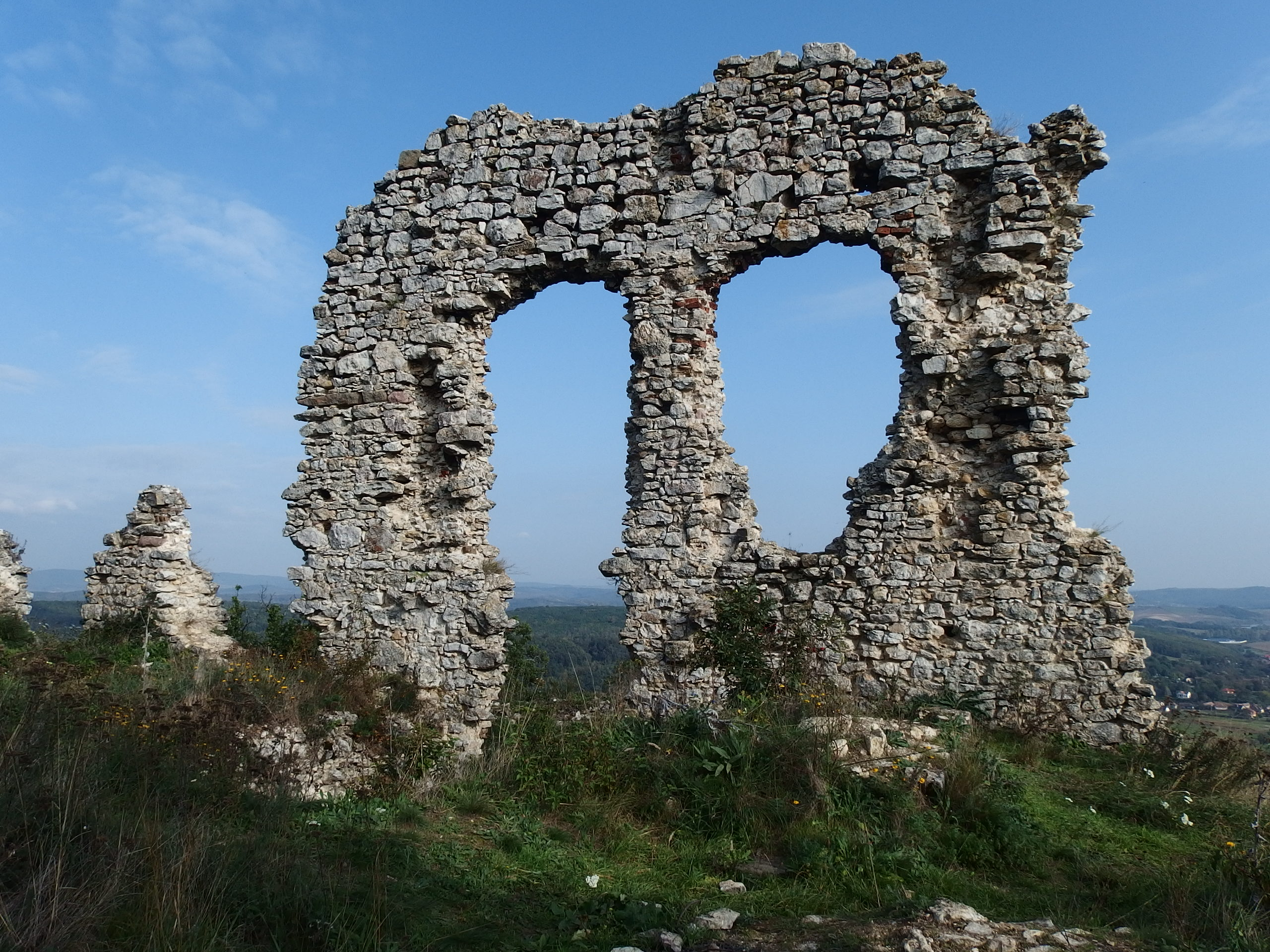 A csővári vár egyik megmaradt fala.